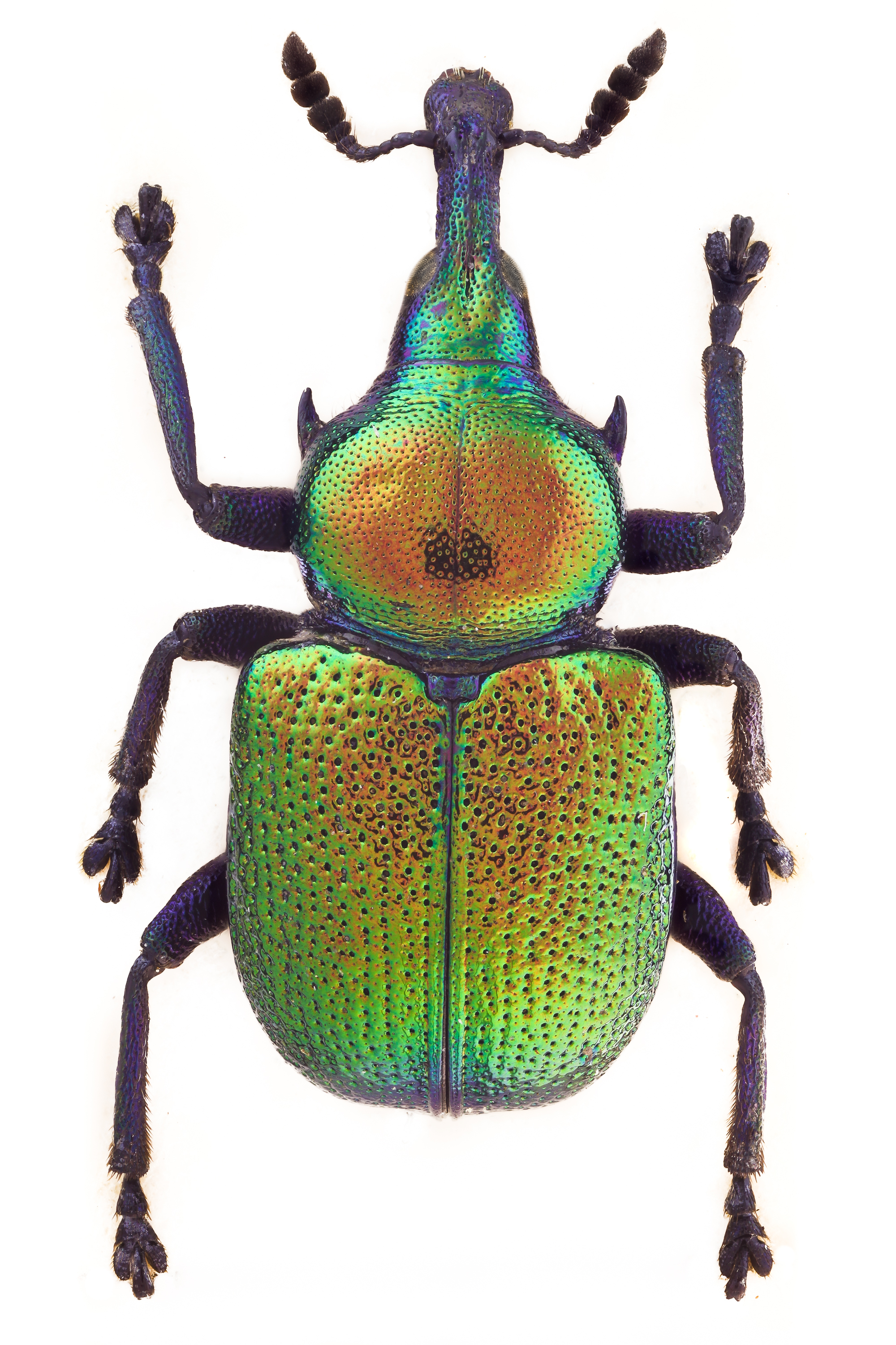 Byctiscus populi, male